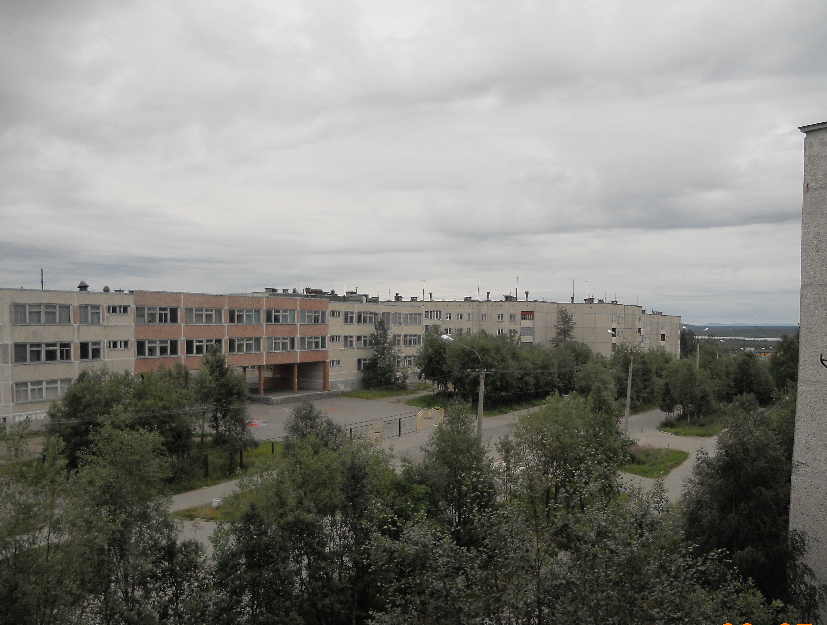 Школа №10 Улица Строителей